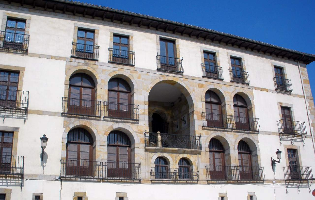 Ordizia (Gipuzkoa) - Palacio Barrena